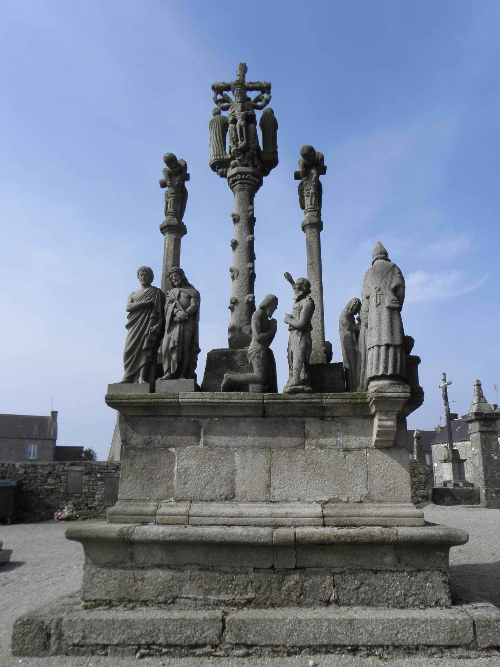 Calvaire de Lanrivain (22). Face est.